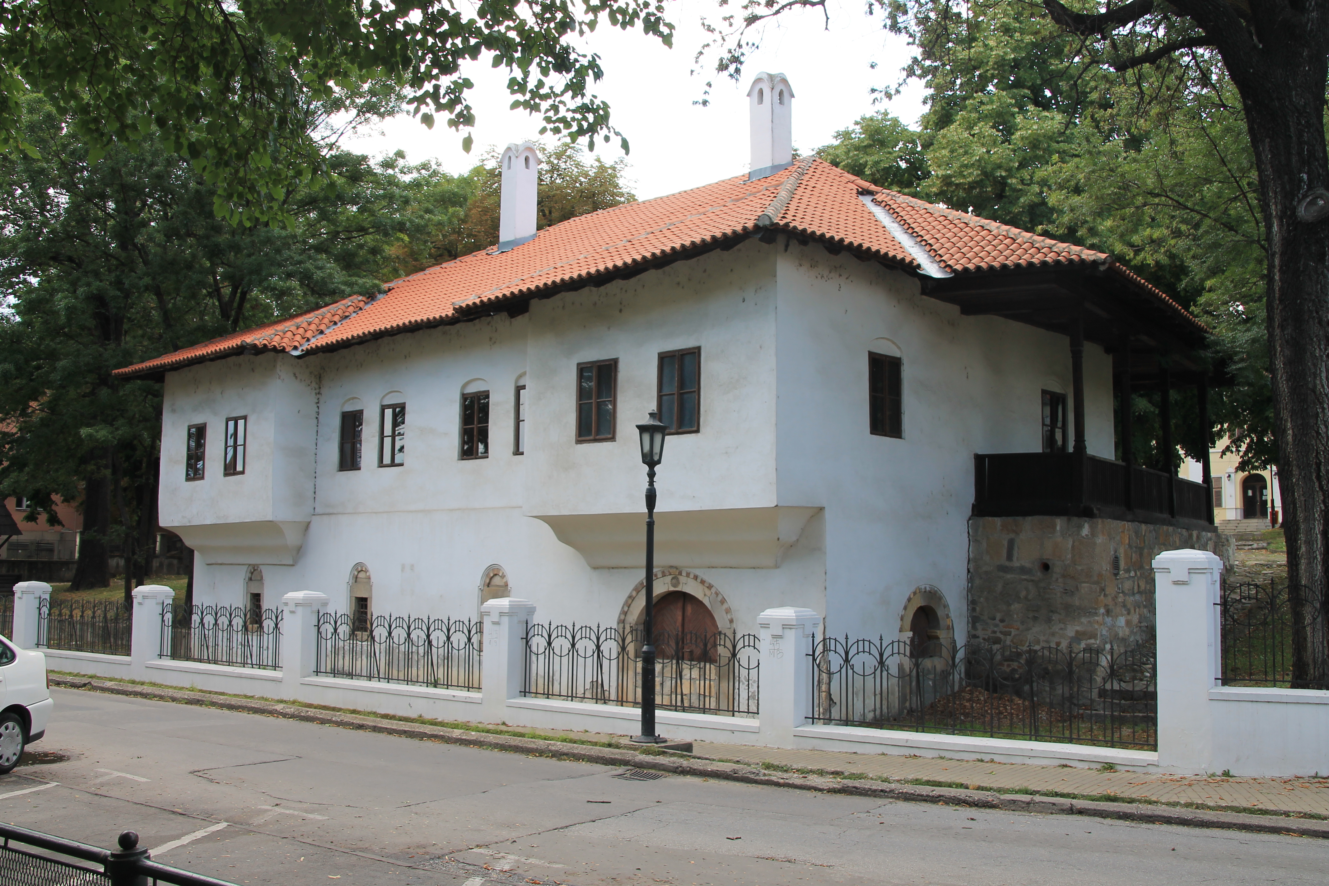 Amidžin konak